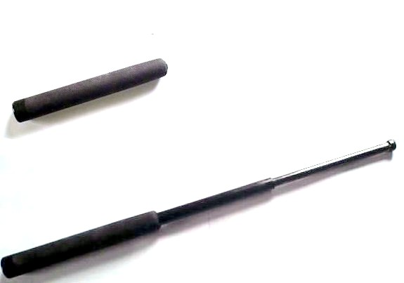 dmg ie, my own work